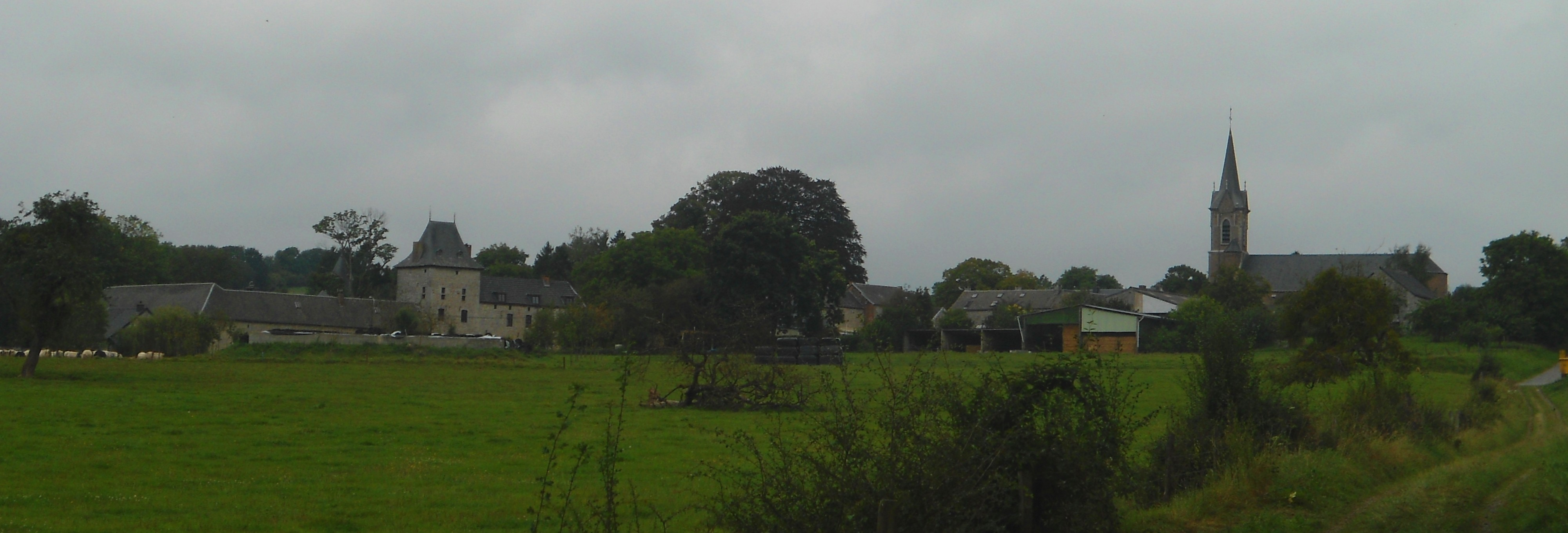 My (Ferrières)